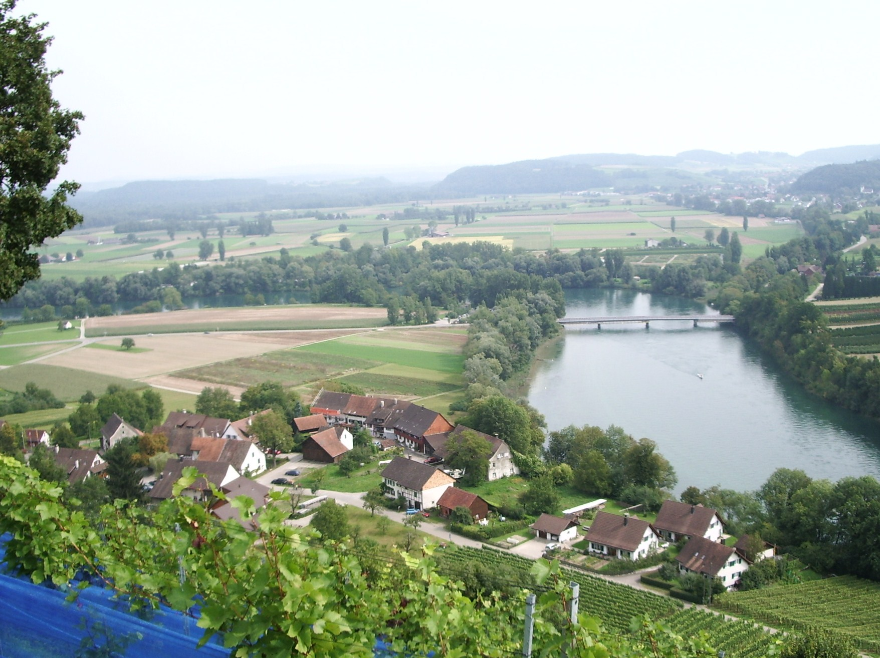 Die Rheinbrücke bei Rüdlingen/SH. Im Hintergrund liegt das Dorf Flaach/ZH.